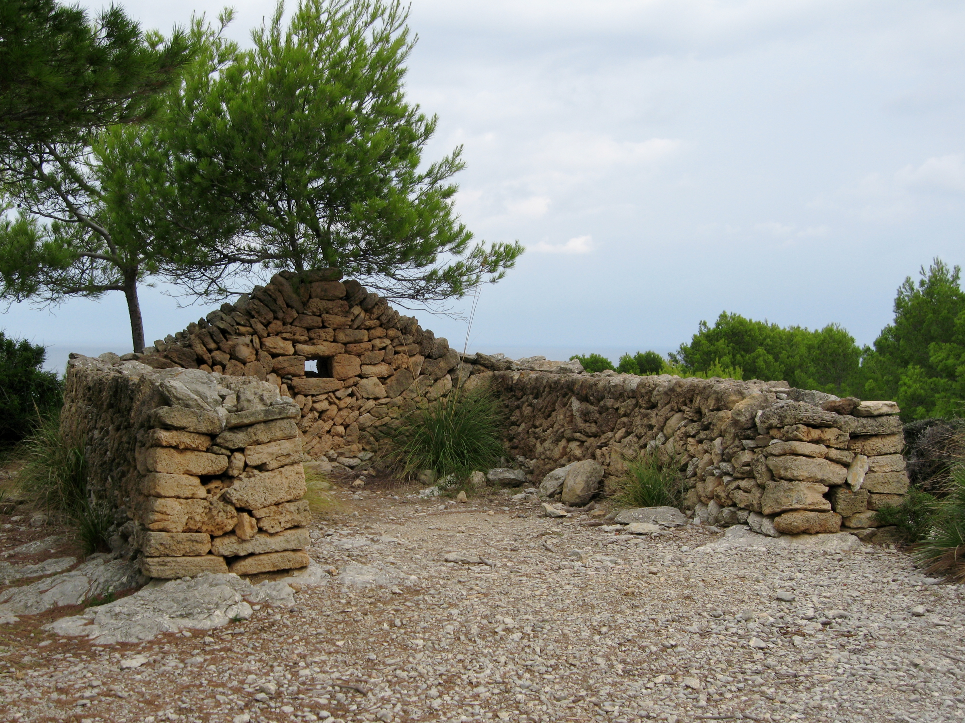 Ruine einer Schutzhütte der Miliz Carabiners oberhalb der Bucht Cala de sa Font Celada an der Nordostküste von Mallorca, Spanien